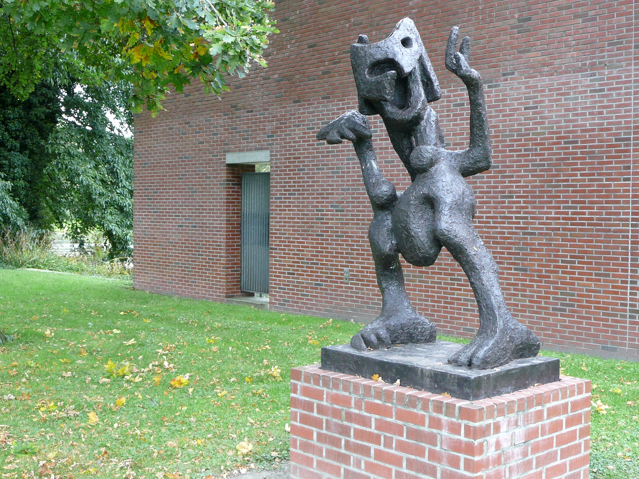 Sculpture by Lotti van der Gaag in Amstelveen/The Netherlands